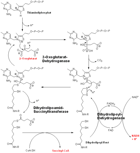 Summary Bildbeschreibung: Reaktionsmechanismus der Decarboxylierung des 2-Oxoglutarats im Citratzyklus. Quelle: selbst erstellt. Fotograf/Zeichner: Minutemen 22:20, 10. Jun 2006 (CEST) Datum: 10. Juni 2006